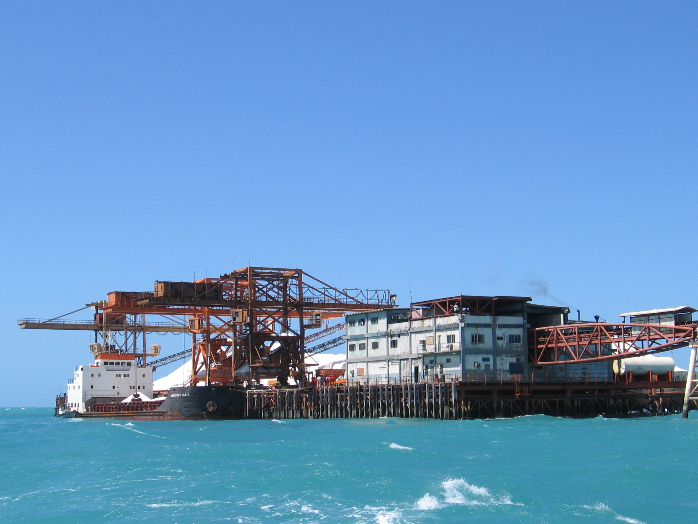 Porto-ilha de Areia Branca, em Areia Branca, Rio Grande do Norte, Brasil.